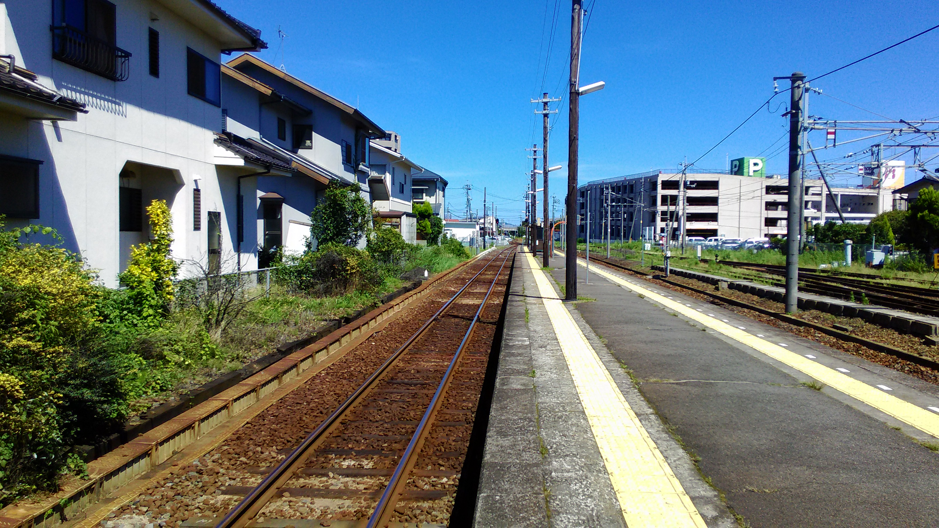 JR西日本境線後藤駅境港方面ホーム